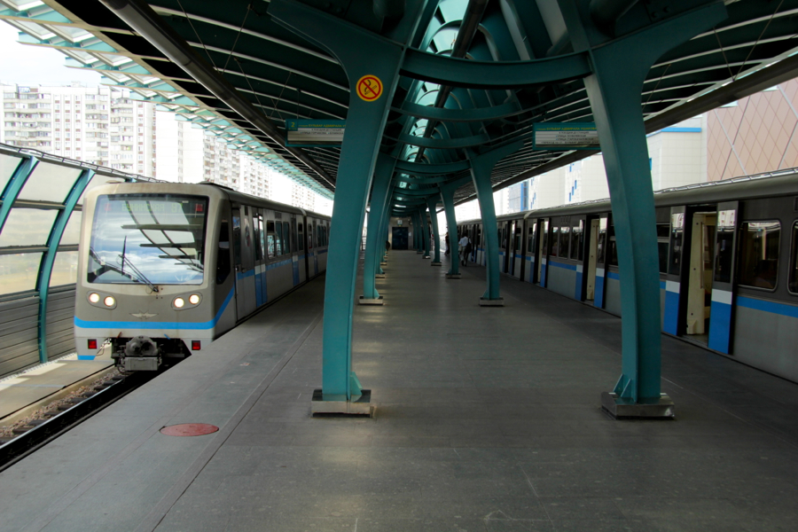 Moscow Metro (Московский метрополитен) Butovskaya Line of Light Metro (Бутовская линия лёгкого метро)